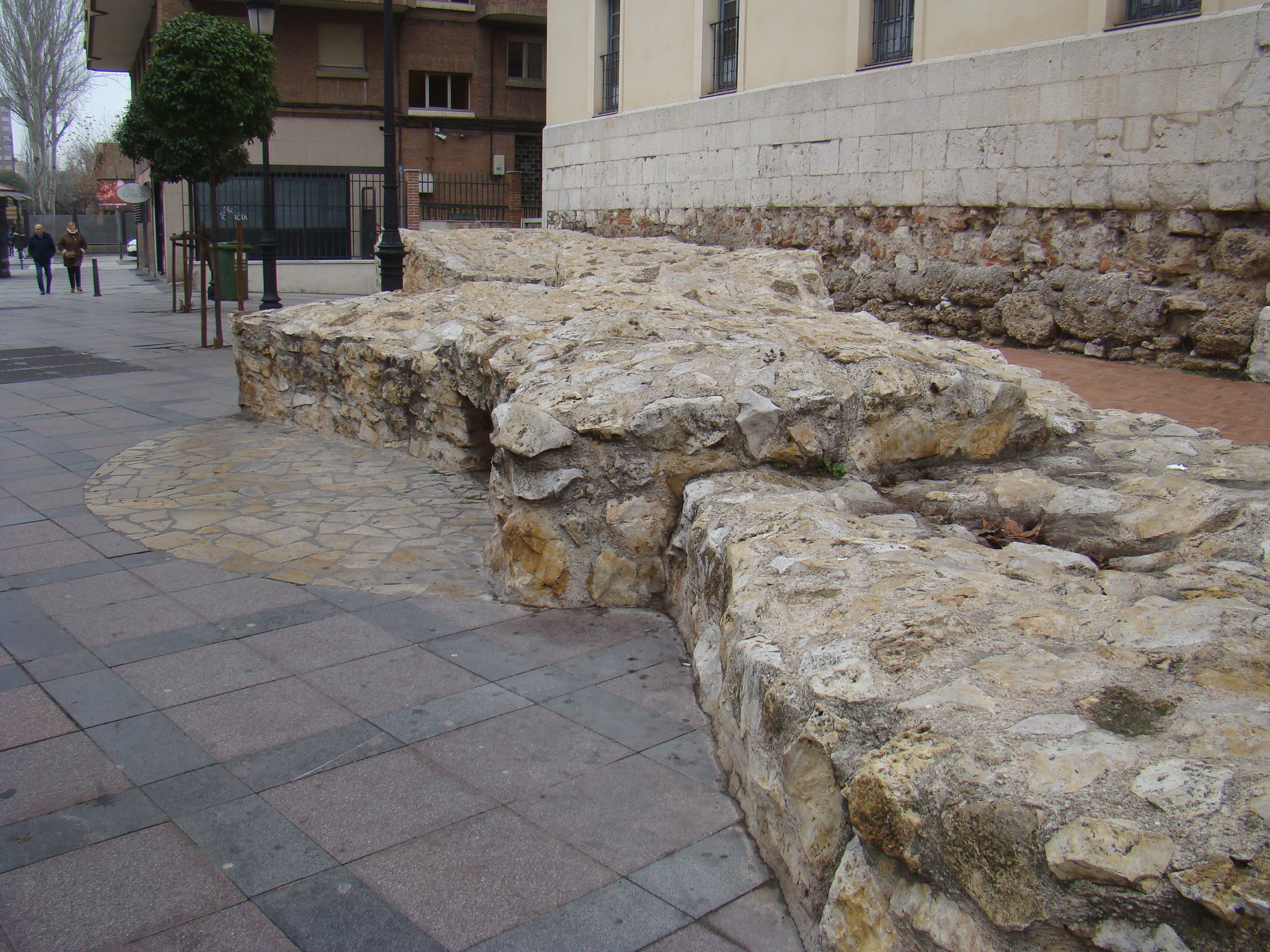 Valladolid, España. Vestigios de la muralla del siglo XII-XIII en el monasterio de San Benito, antiguo alcazarejo.